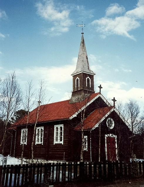 Holøydalen kapell